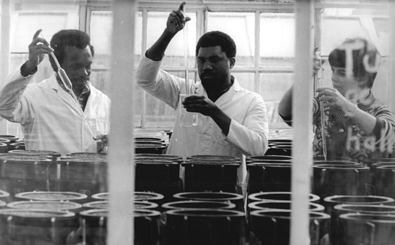 Leipzig, Universität, Agrarwissenschaft, Labor ADN-ZB Grubitzsch 26.4.84 Bez. Leipzig: Ausbildung von Agrarexperten-Experimentelle Untersuchungen nehmen Bernadino Silva von Sao Tome und Principe und Oberassistent Dr. Jürgen Pohlen in der Lehr- und Versuchsstation des Instituts für Tropische Landwirtschaft der Karl-Marx-Universität Leipzig in Liebertwolkwitz vor. Die Einrichtung hat seit mehr als zwei Jahrzehnten hervorragenden Anteil an der Ausbildung von Agrarexperten aus Afrika, Asien und Lateinamerika. Bisher erwarben hier 259 junge Bürger aus 53 Ländern ihren Hochschulabschluß. - siehe auch 1984-0426-6N